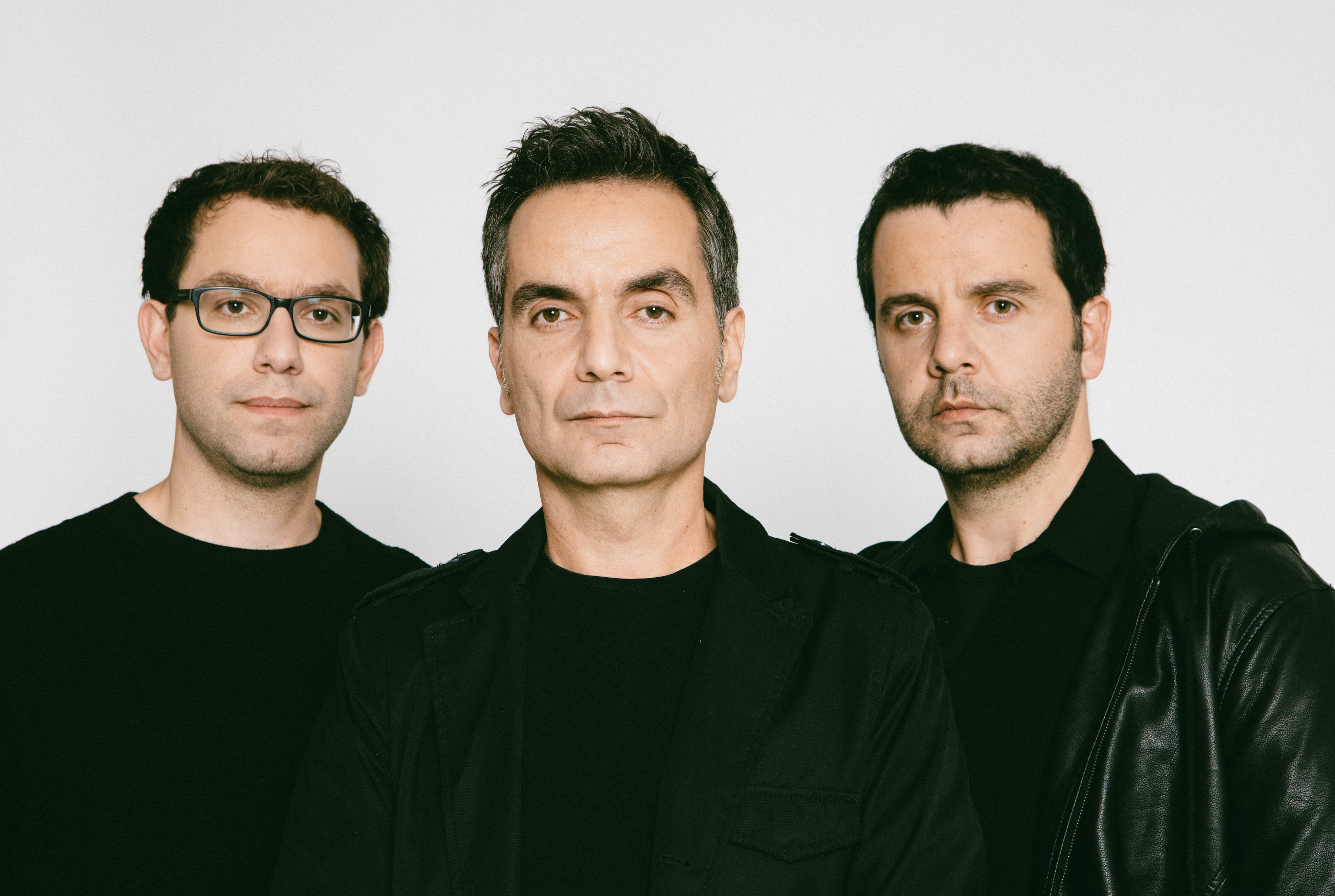 אלף.דלת